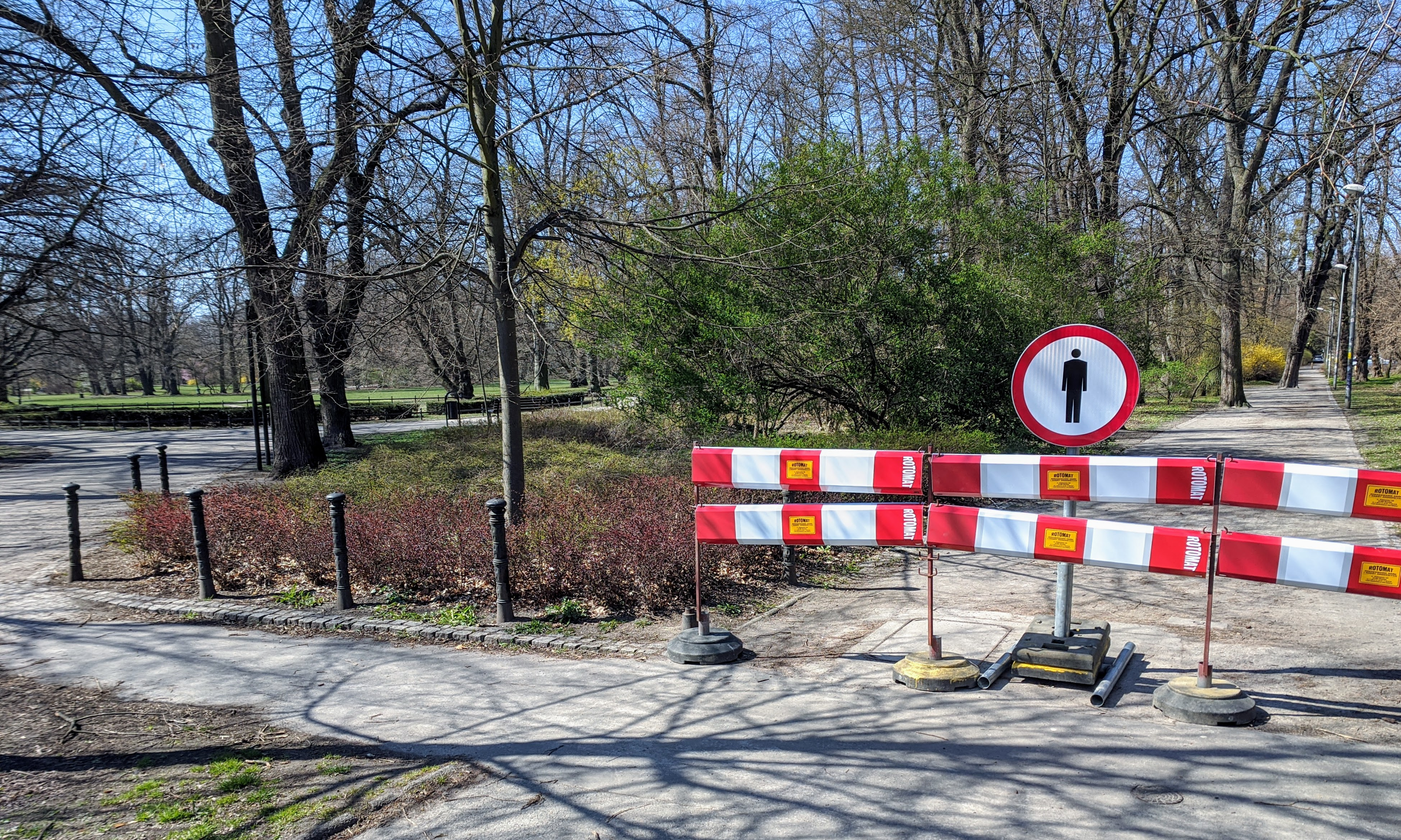 Zakaz wstępu do Parku Południowego we Wrocławiu po ogłoszeniu 1.04.2020 restrykcji związanych z epidemią COVID-19